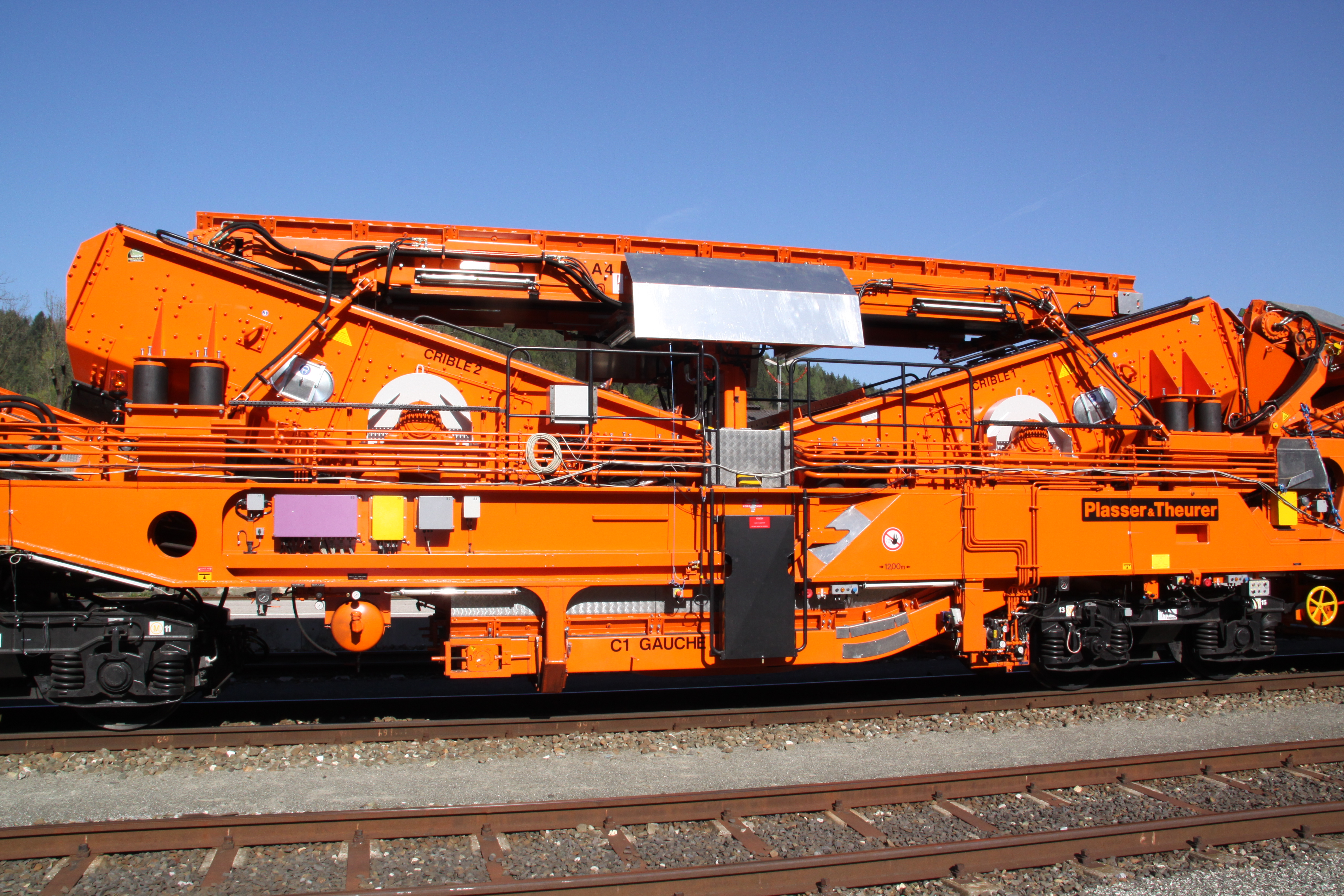 Doppelte Siebanlage der Bettungsreinigungsmaschine „RM 900 - HD 100“ der Firma Plasser & Theurer, Baujahr 2009 im Bahnhof Aspang (Bild 2)